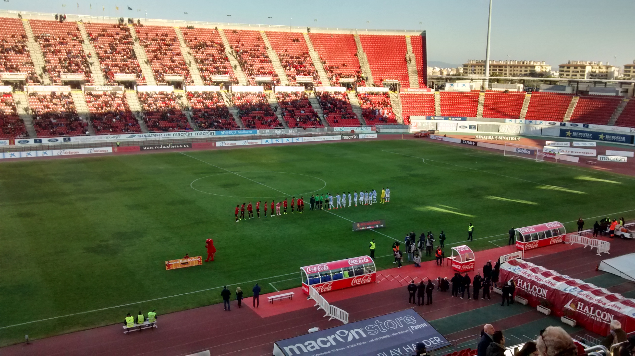 Partido Mallorca 0-2 Leganés de la temporada 2014/15 de Segunda División